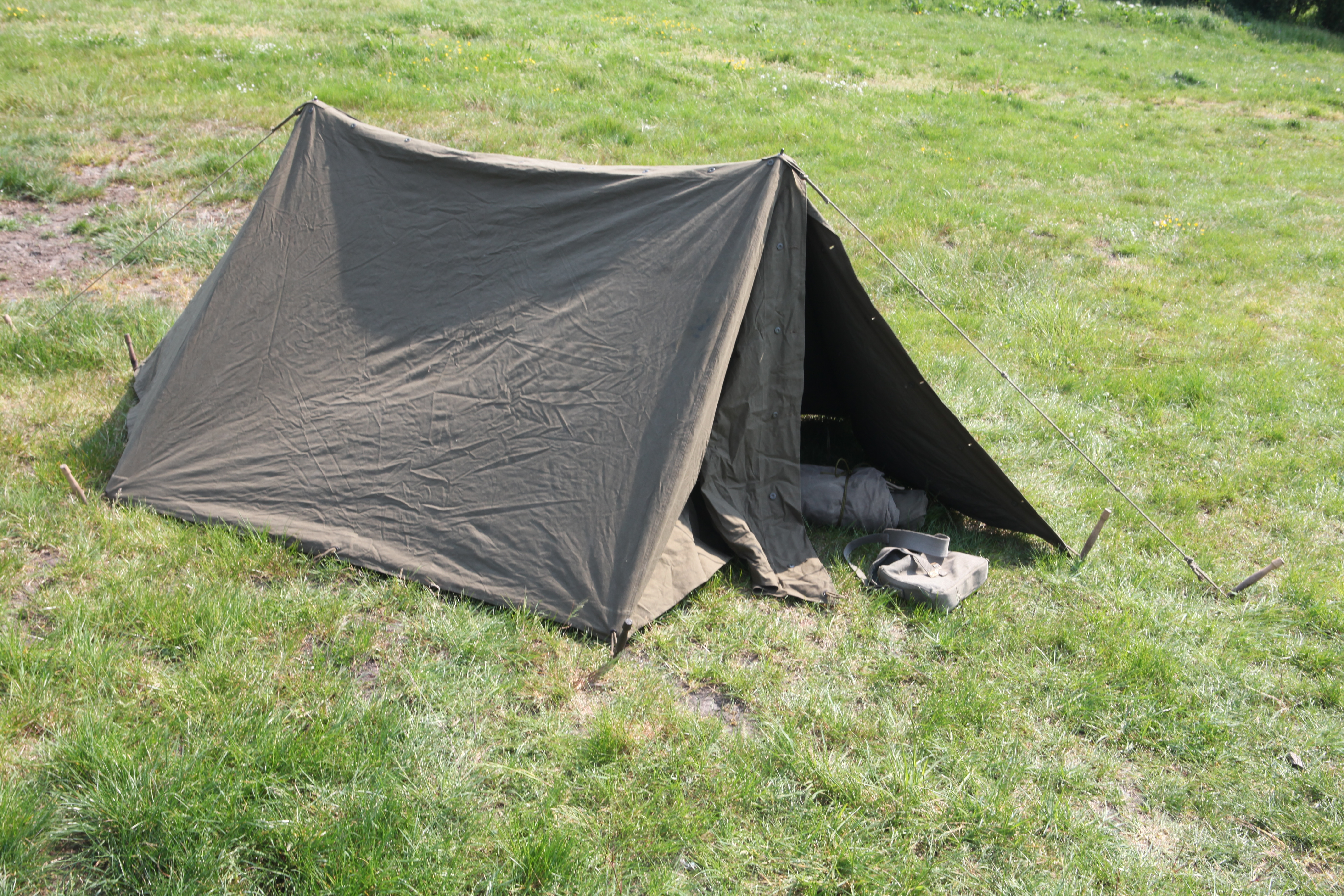 kleine twee persoons legertent 2 persoons ,,pub,, tent NL leger landmacht datum 1955